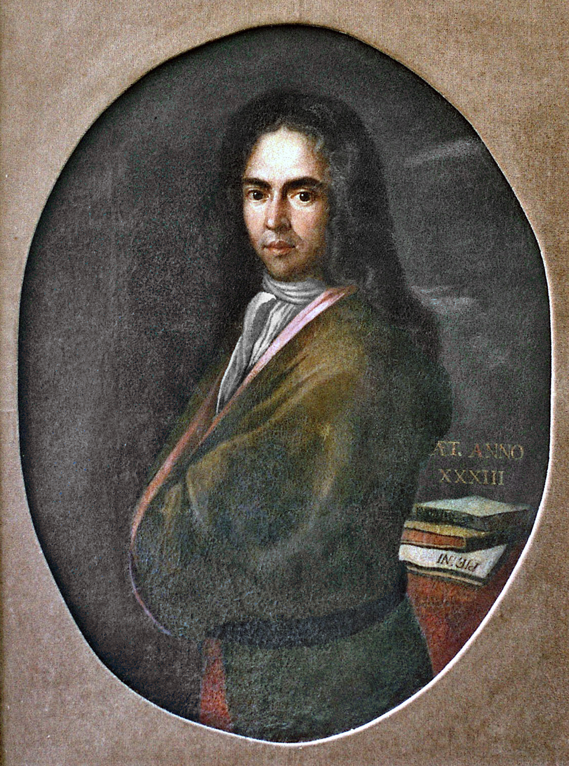 Ivan Gundulić, the most prominent Croatian Baroque poet from the Republic of Ragusa; archivo de dominio público, autor fallecio mas de 100 años